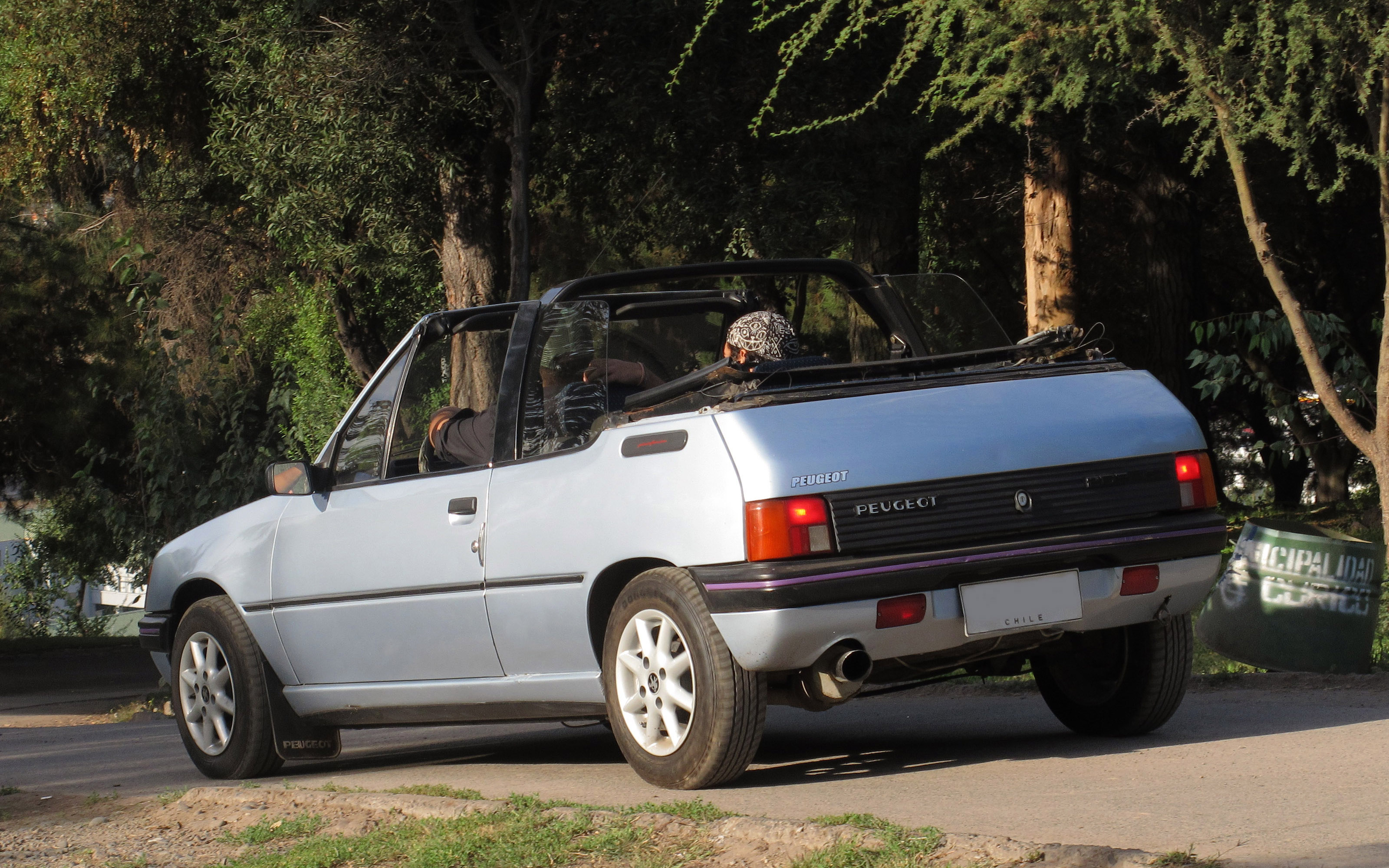 Peugeot 205 1.4 GT Cabriolet 1989